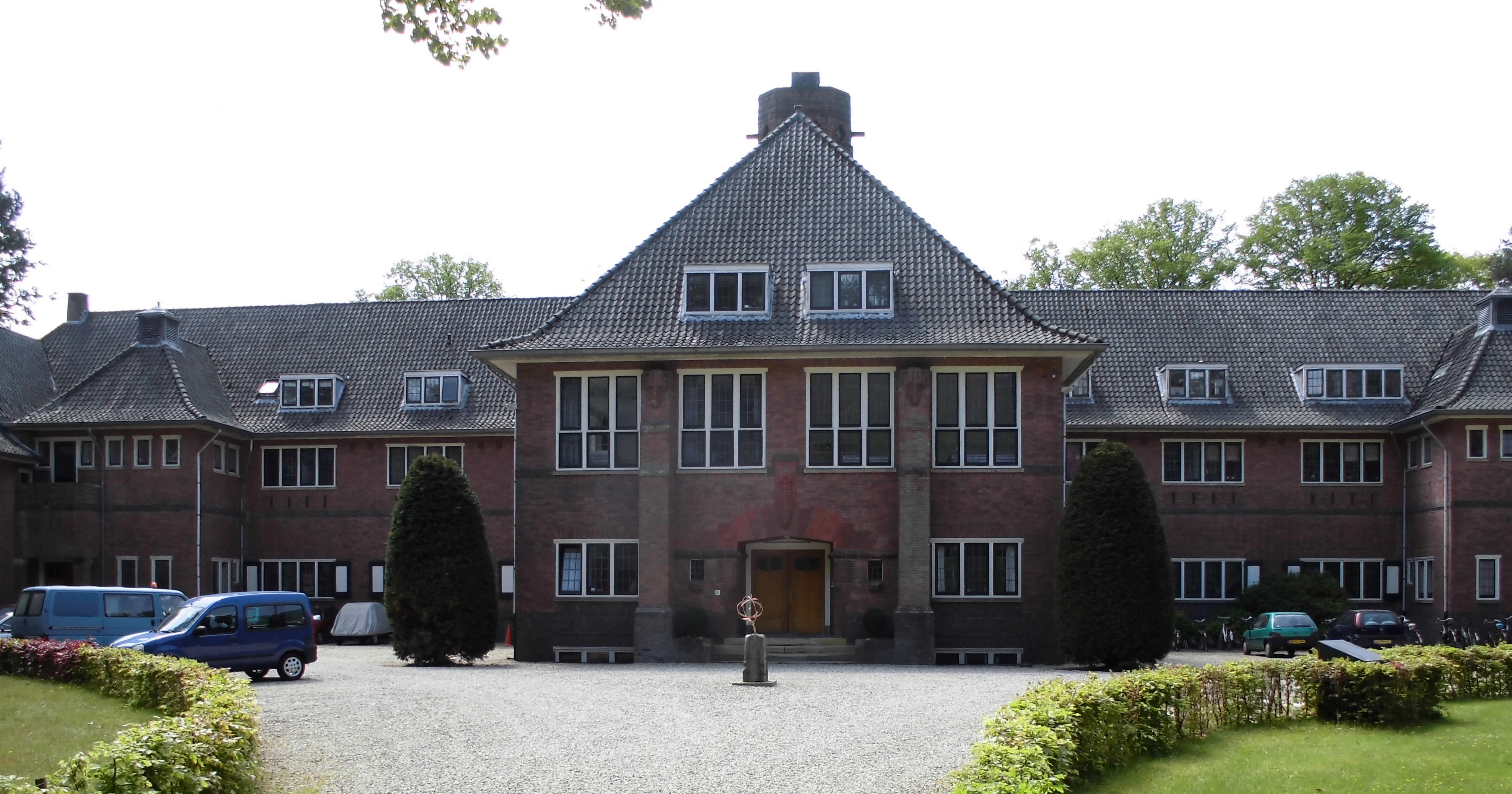 De Wittenberg Krakelingweg 10 Zeist